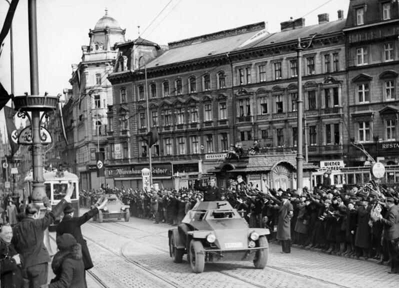 This description has been identified as biased or incorrect: Nazi-Propaganda ("Einmarsch")Österreich, Wien.- Einmarsch deutscher Truppen, jubelnde Menschen mit Hitlergruss vor Warenhaus Leitner, auf der Straße Panzerspähfahrzeuge (Sd.Kfz. 221) Information added by Wikimedia users.